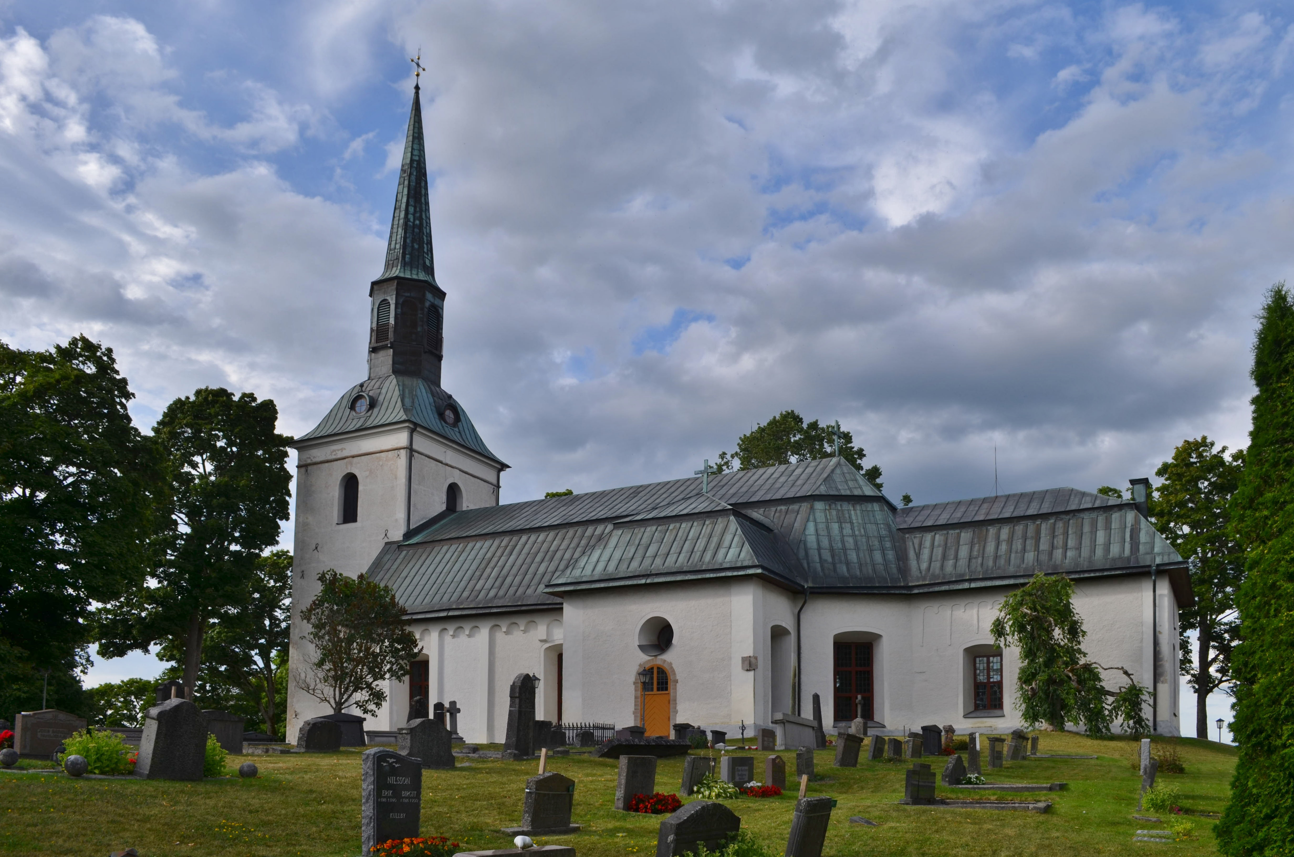 Kils kyrka